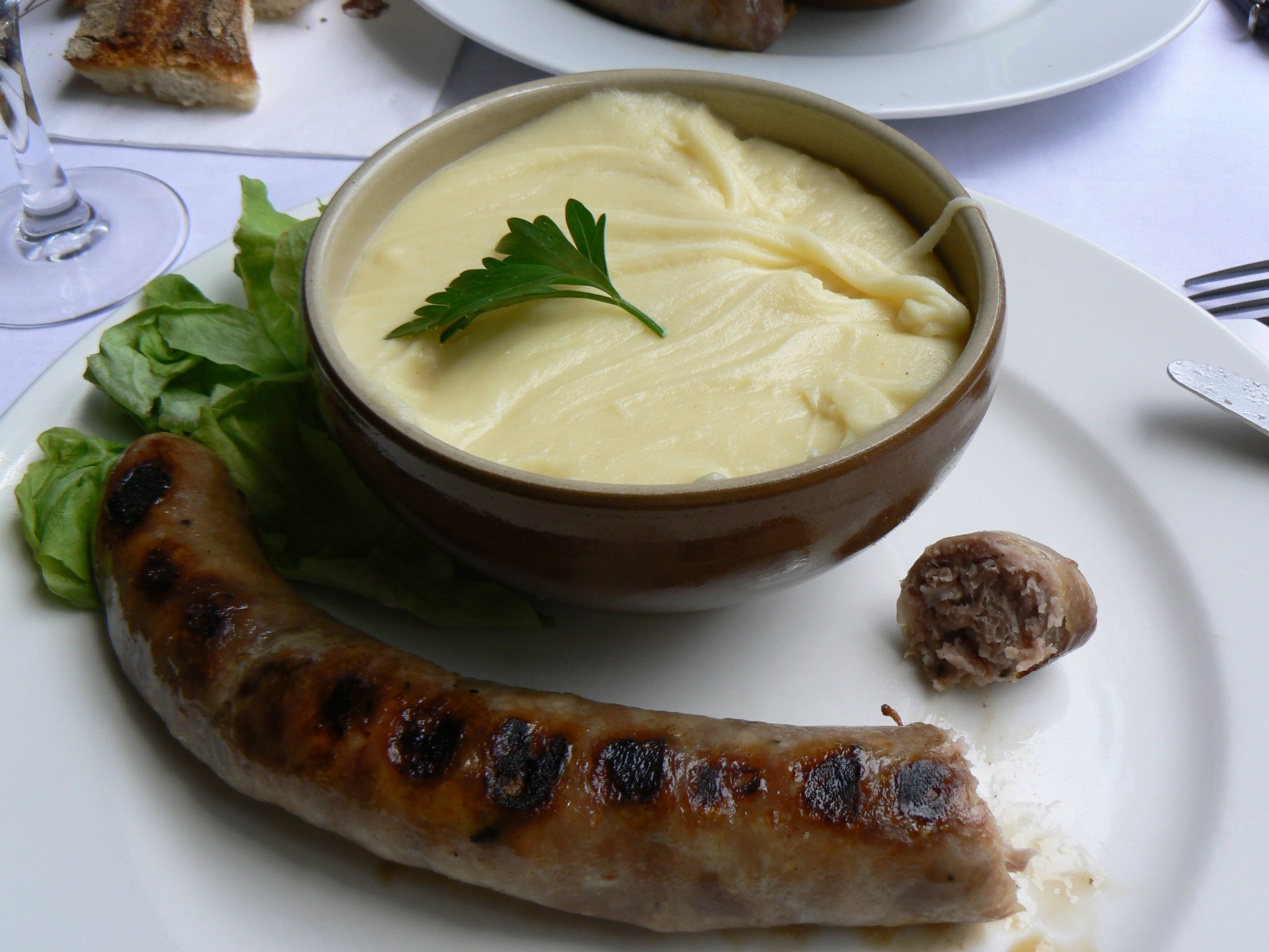 L'aligot (en occità, "aligòt") és un plat occità de muntanya, a base de patata i formatge fresc.